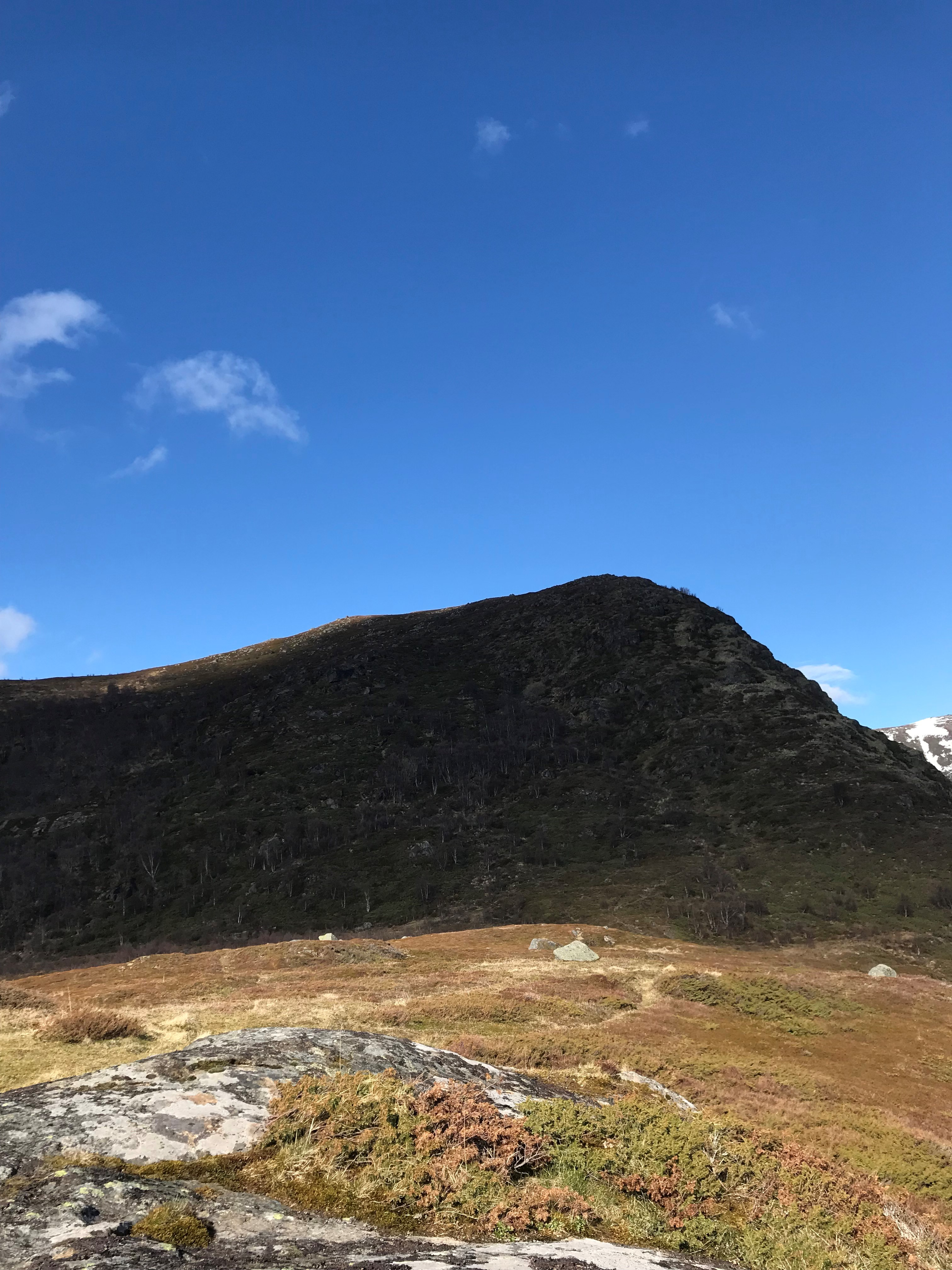 VetenSettFraKallsnes